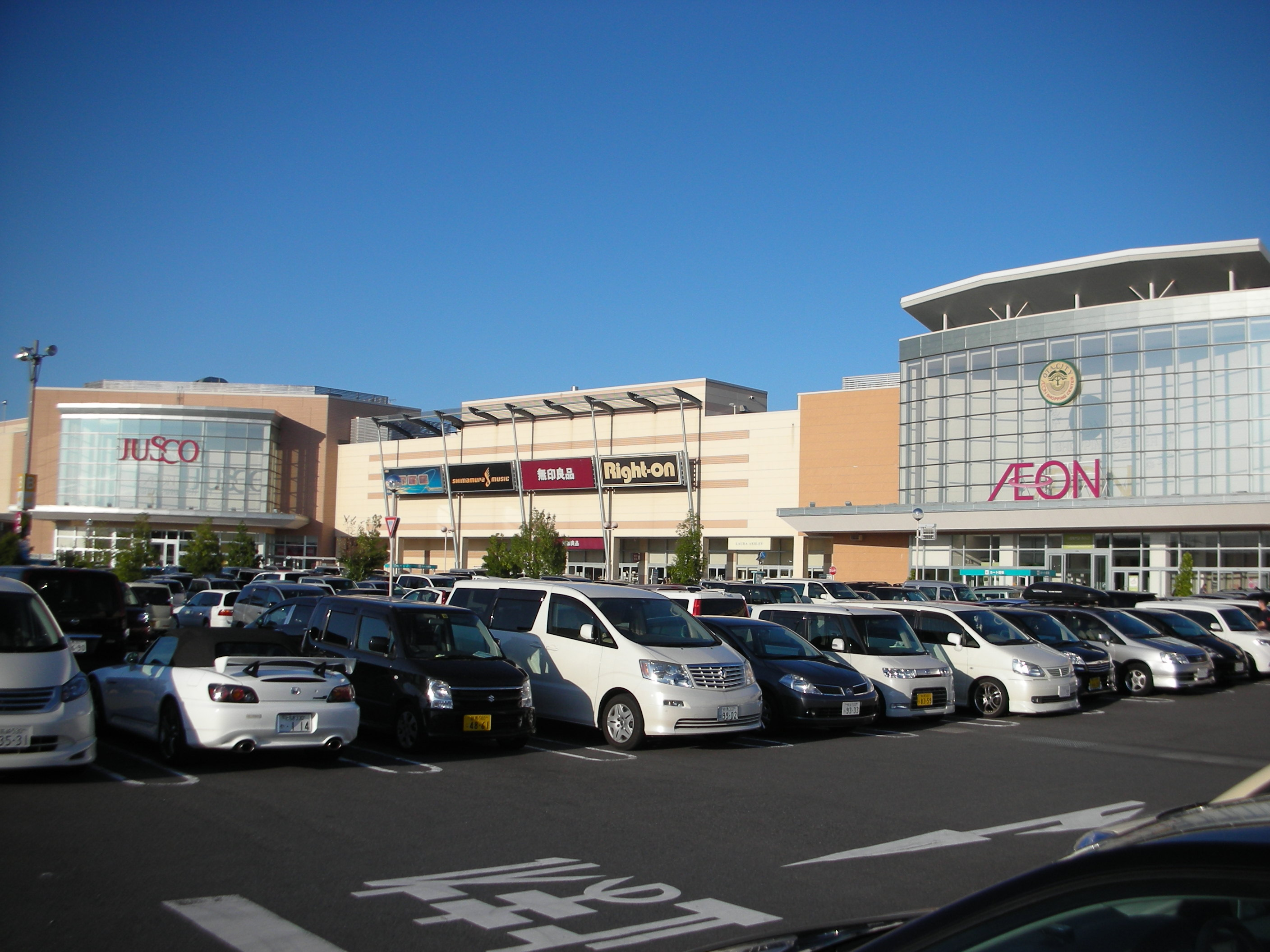 イオンモール太田の外観